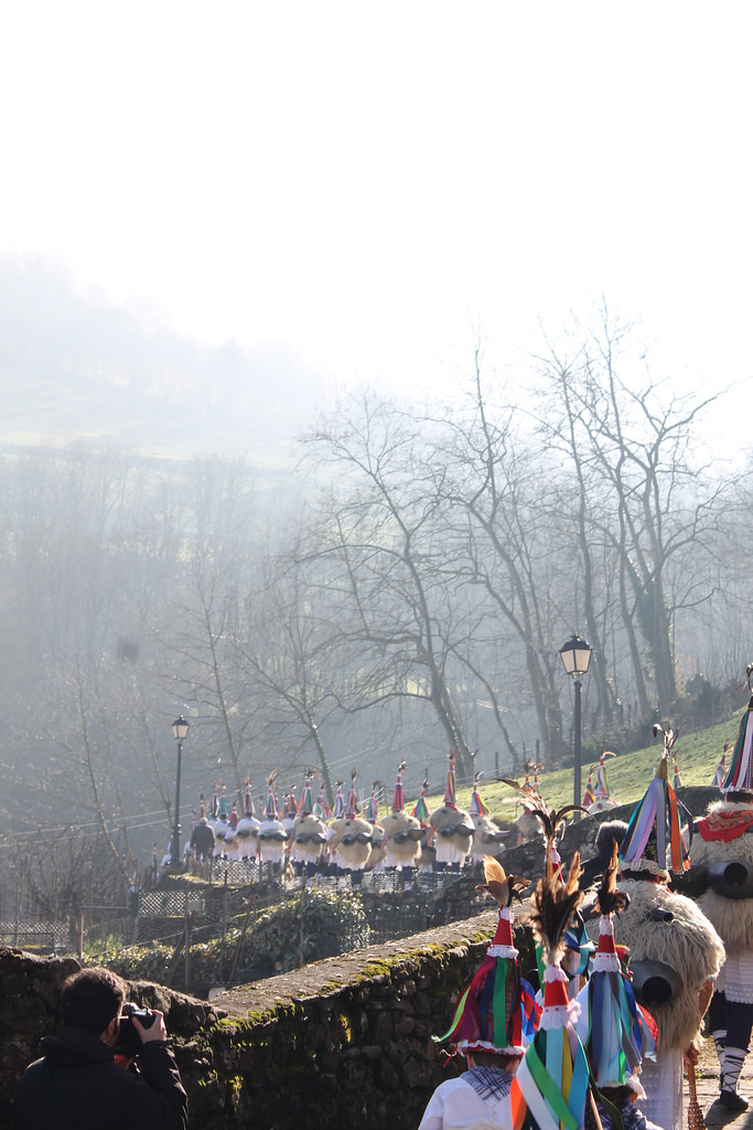 Joaldunak 2018